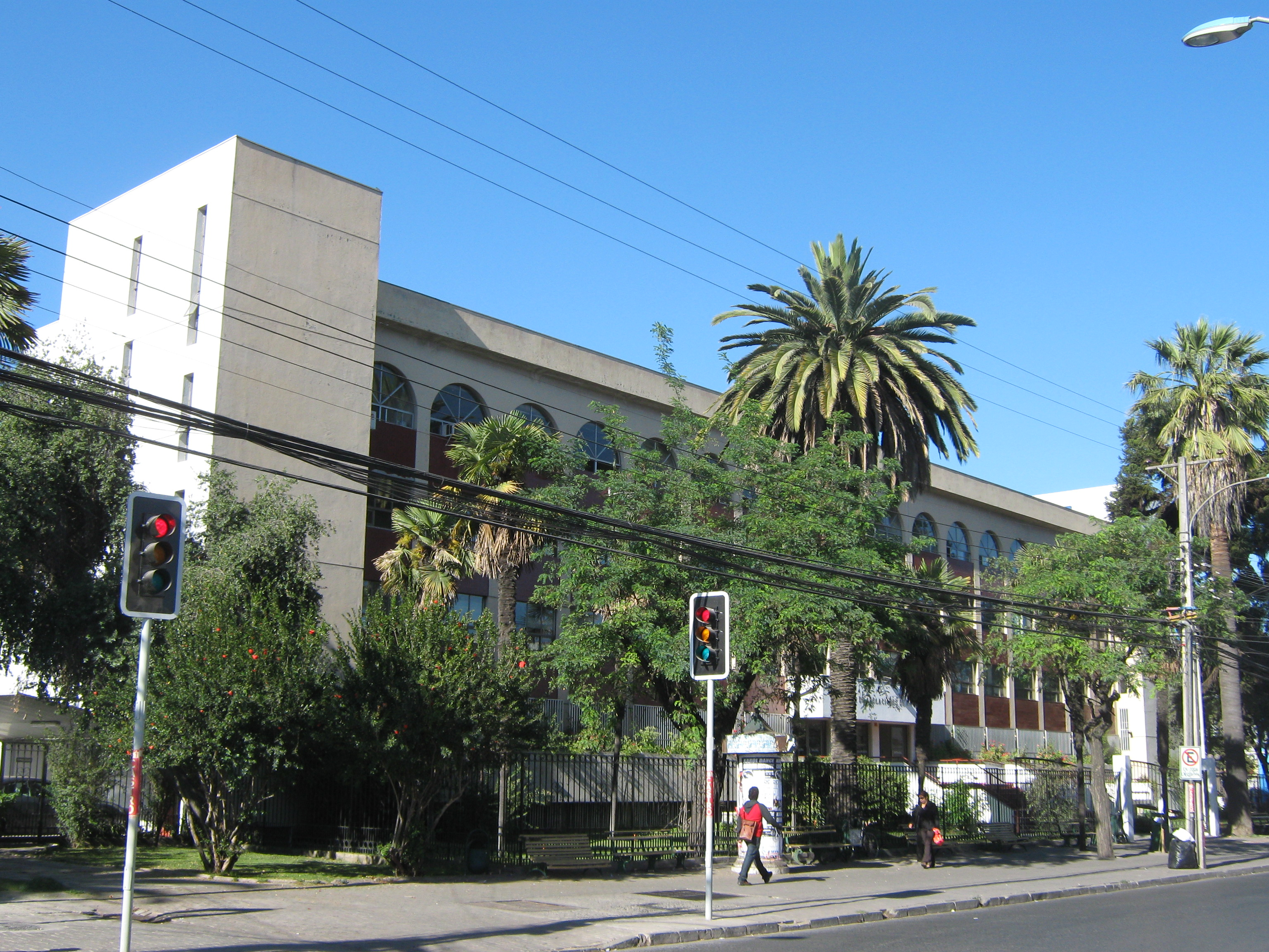 Corte de Apelaciones de Rancagua Ave. Brasil